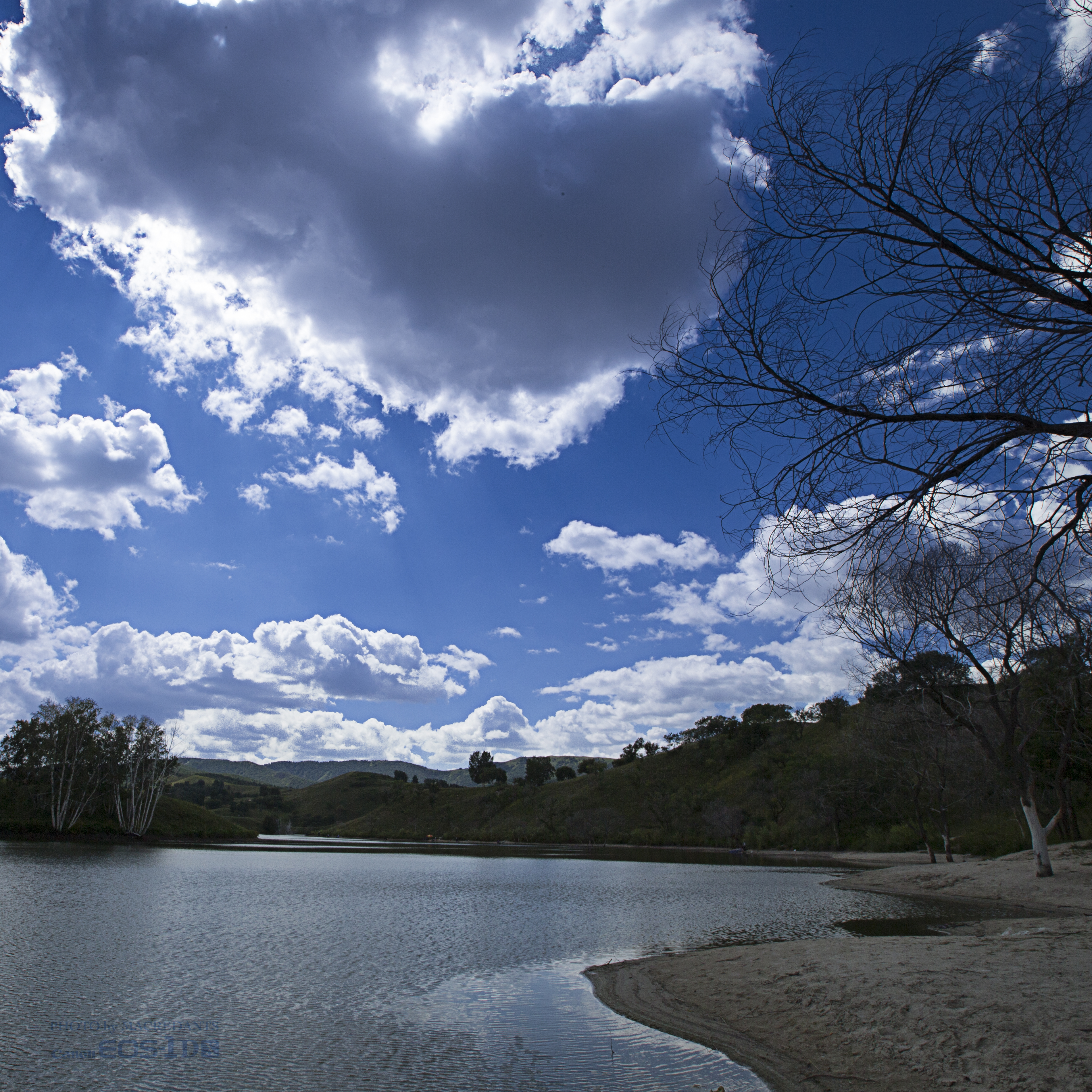 Hexigten, Chifeng, Inner Mongolia, China